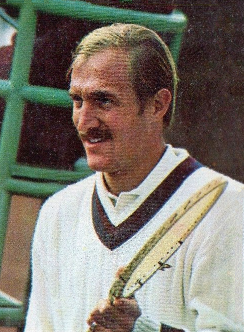 CAMPIONI dello SPORT 1973/74-Figurina n.361- SMITH-USA-TENNIS